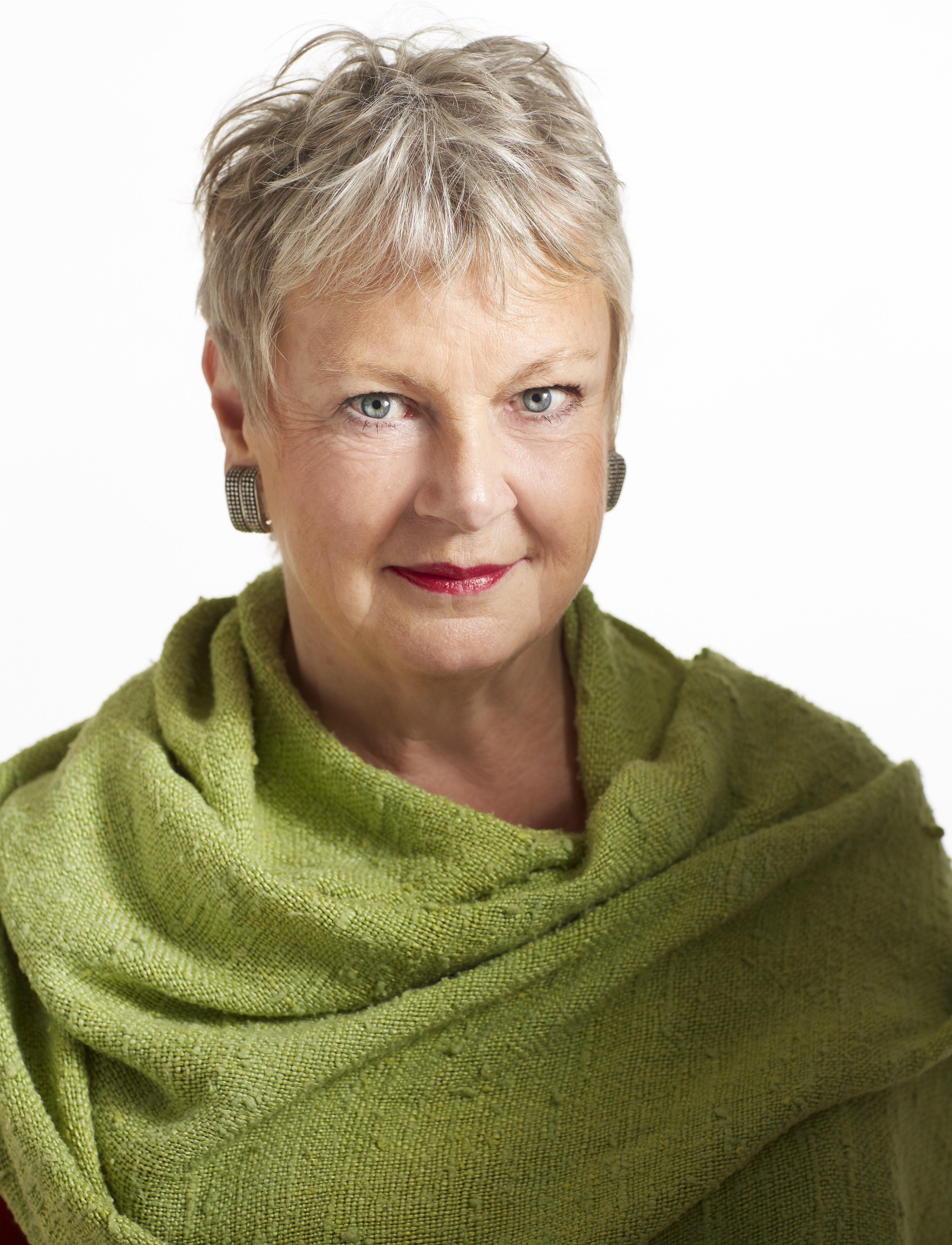 Författaren Margareta Hägglund.